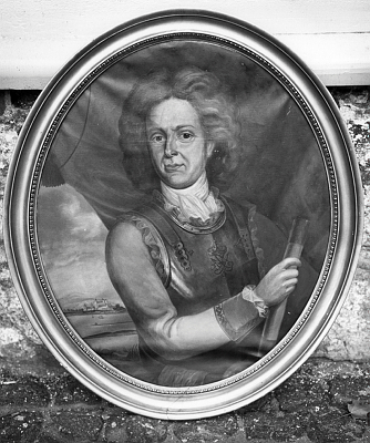 Generalmajor, Kommandant Akershus, Georg von Bertouch